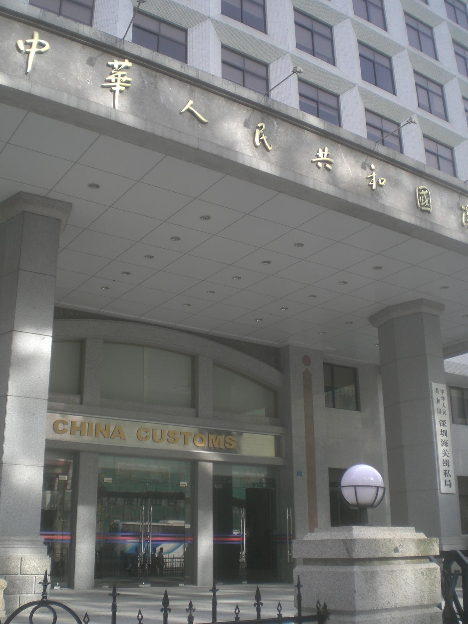 深圳羅湖和平路海關